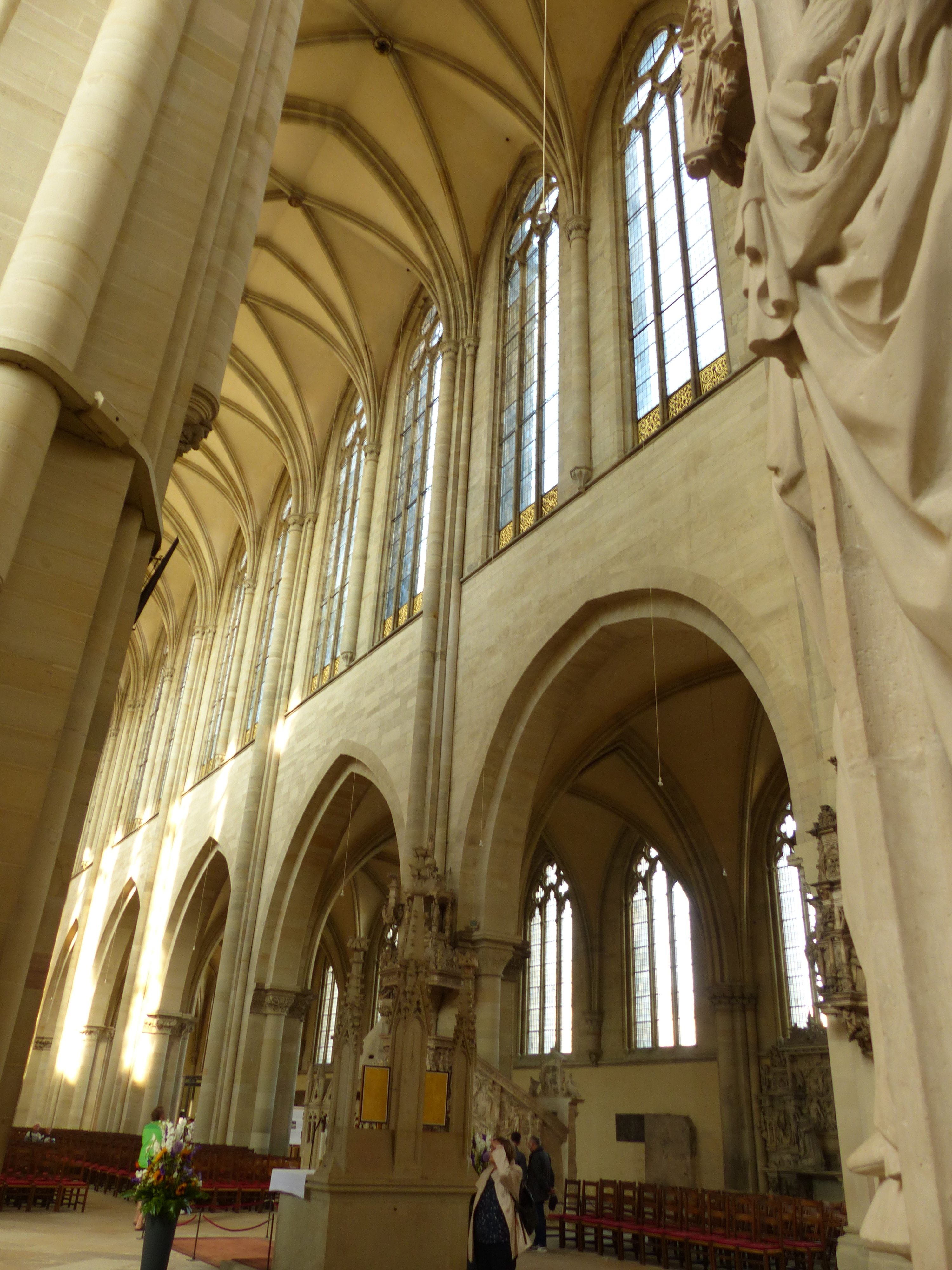 Nördlicher Obergaden des Langhauses des Magdeburger Doms von der Vierung gesehen